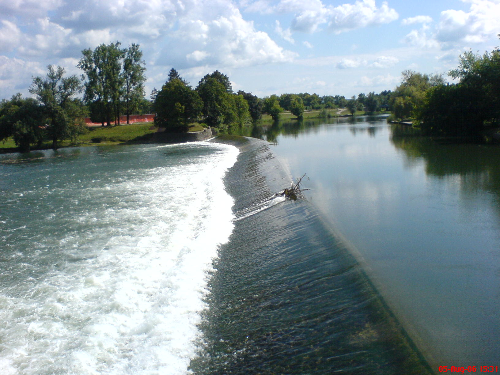 Rijeka Korana u Karlovcu